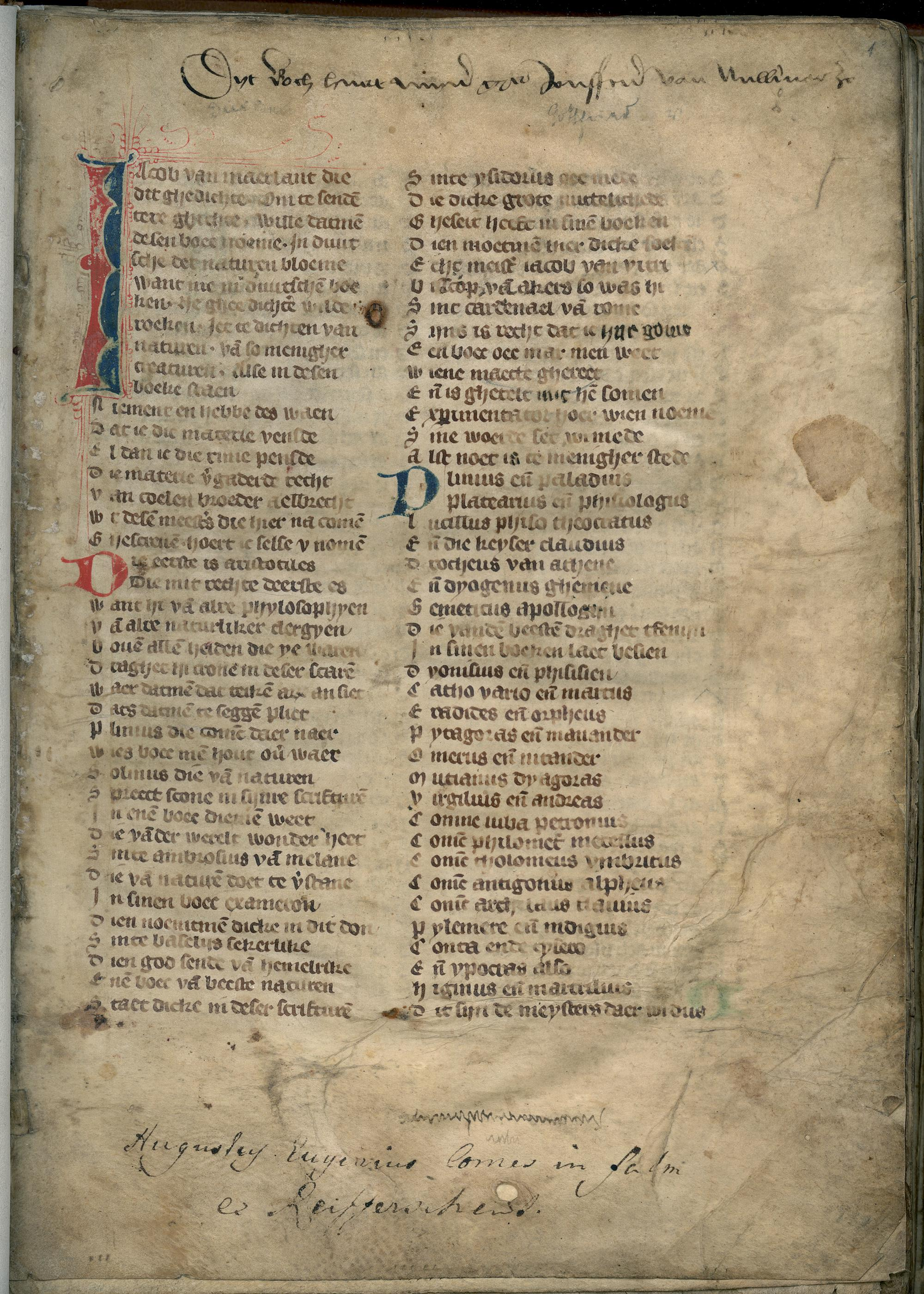 Der naturen bloeme Dycksche Handschrift, Universitäts- und Landesbibliothek Münster Blatt 1 recto (Textanfang)